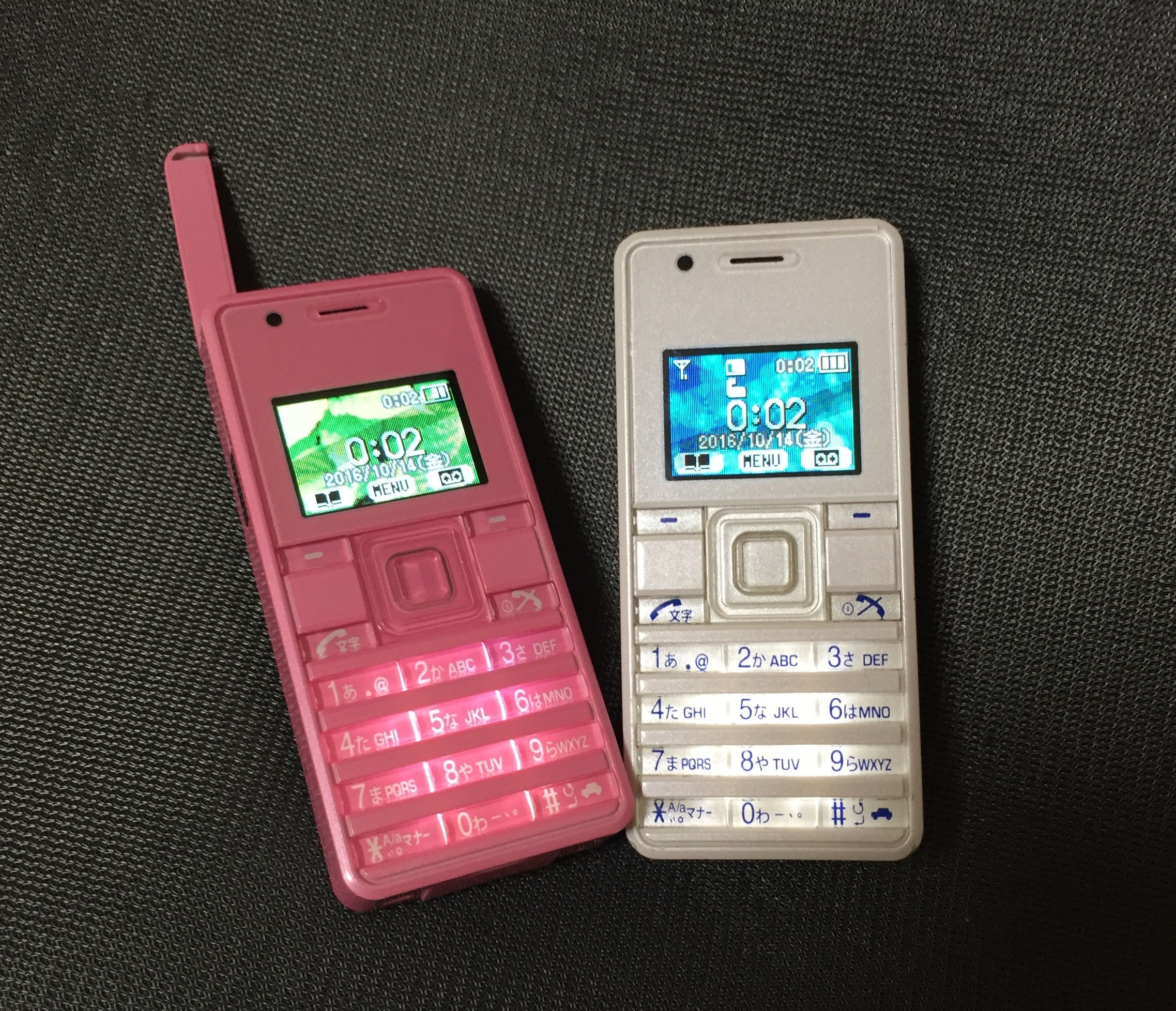 フリスクサイズのPHS